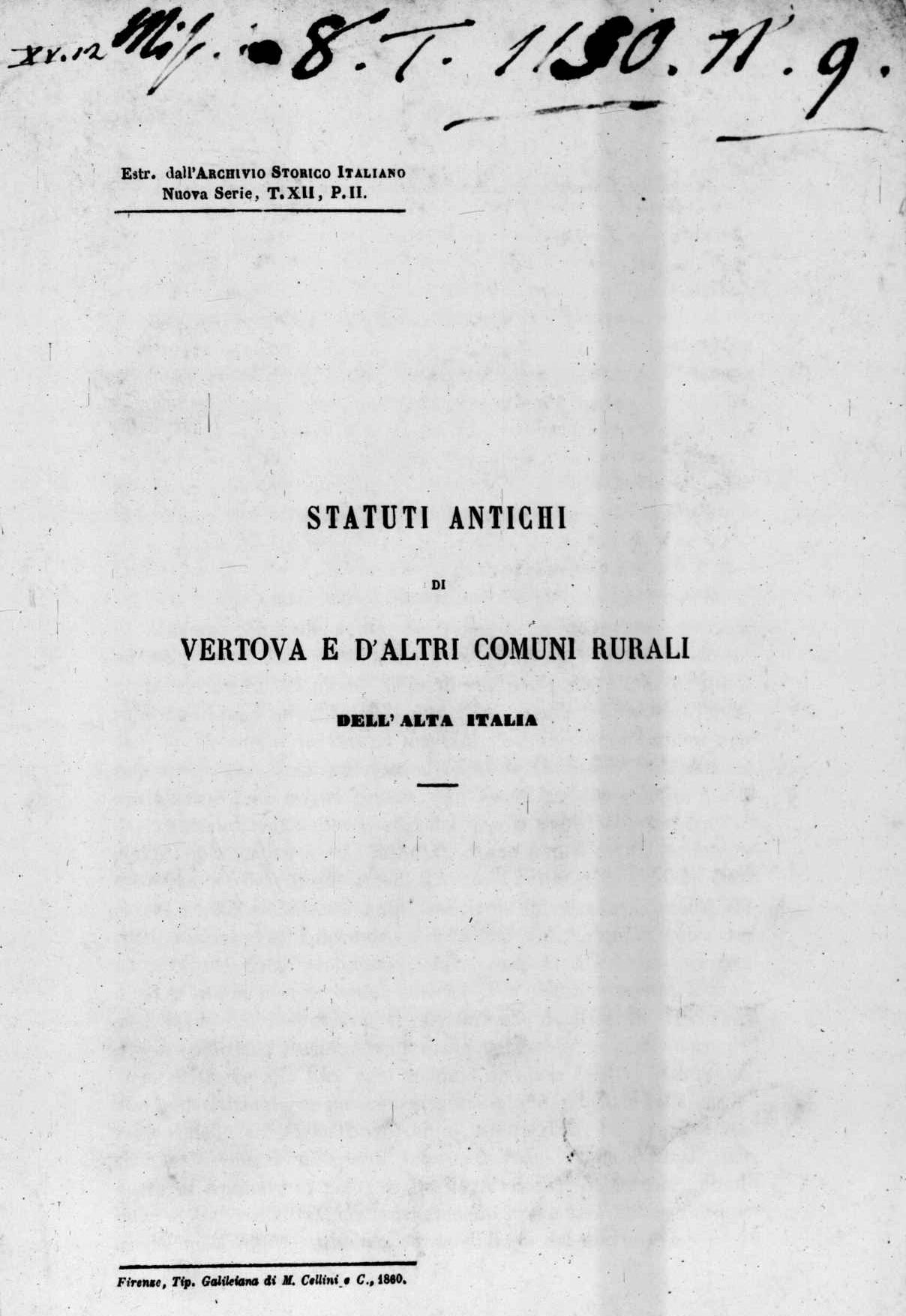 Frontespizio